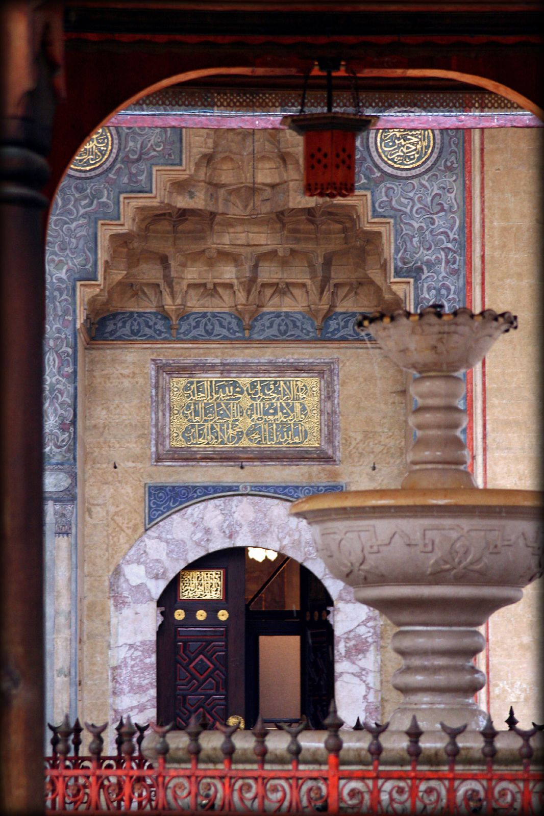 (Baščaršijska Džamija) In Sarajevo.